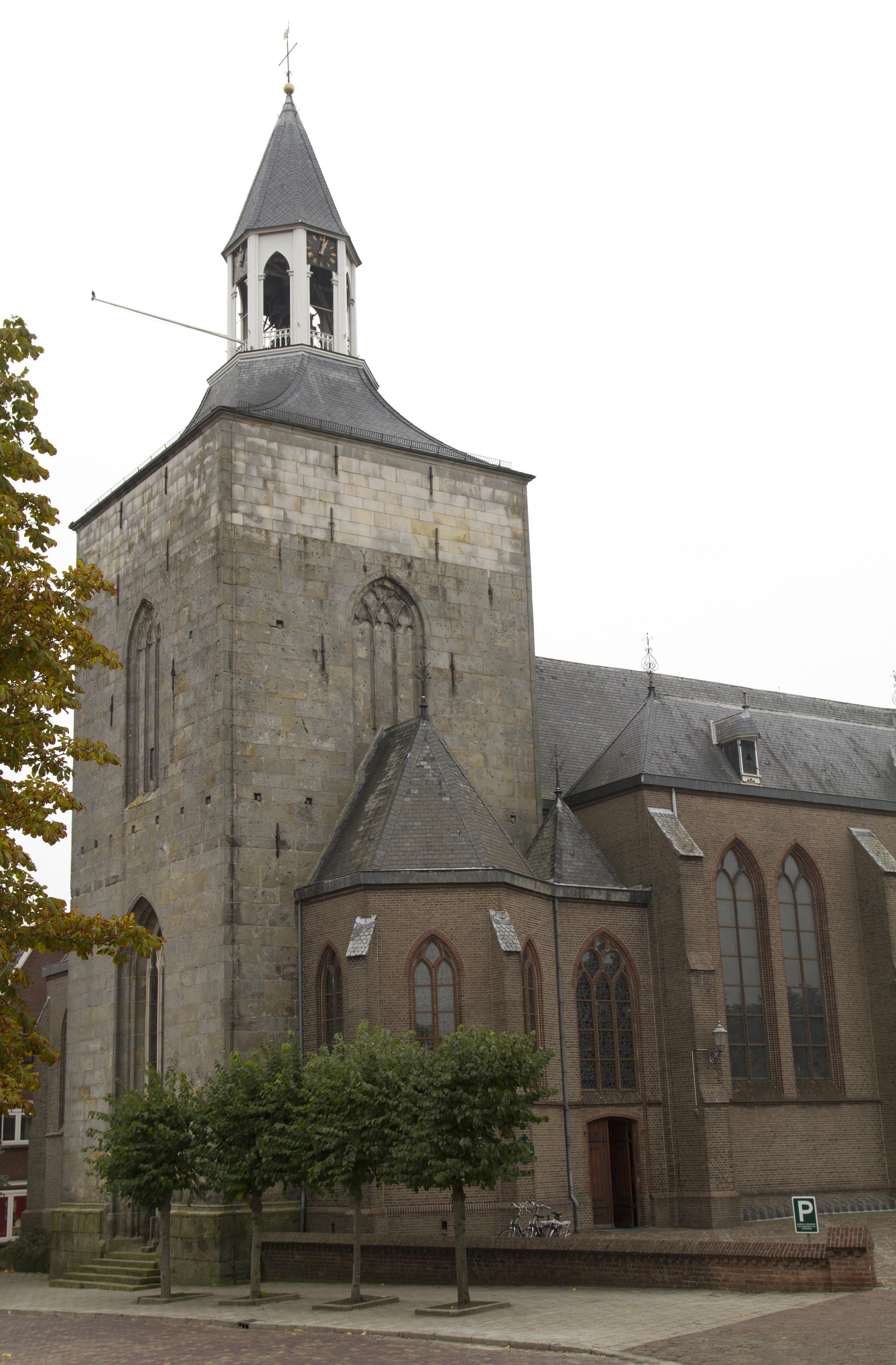 Architect Alfred Tepe ontwierp deze kerk met toren die officieel in gebruik werd genomen op 30 juni 1897. Op 6 januari 2000 als eerste kerk in het nieuwe millennium verheven tot Basiliek